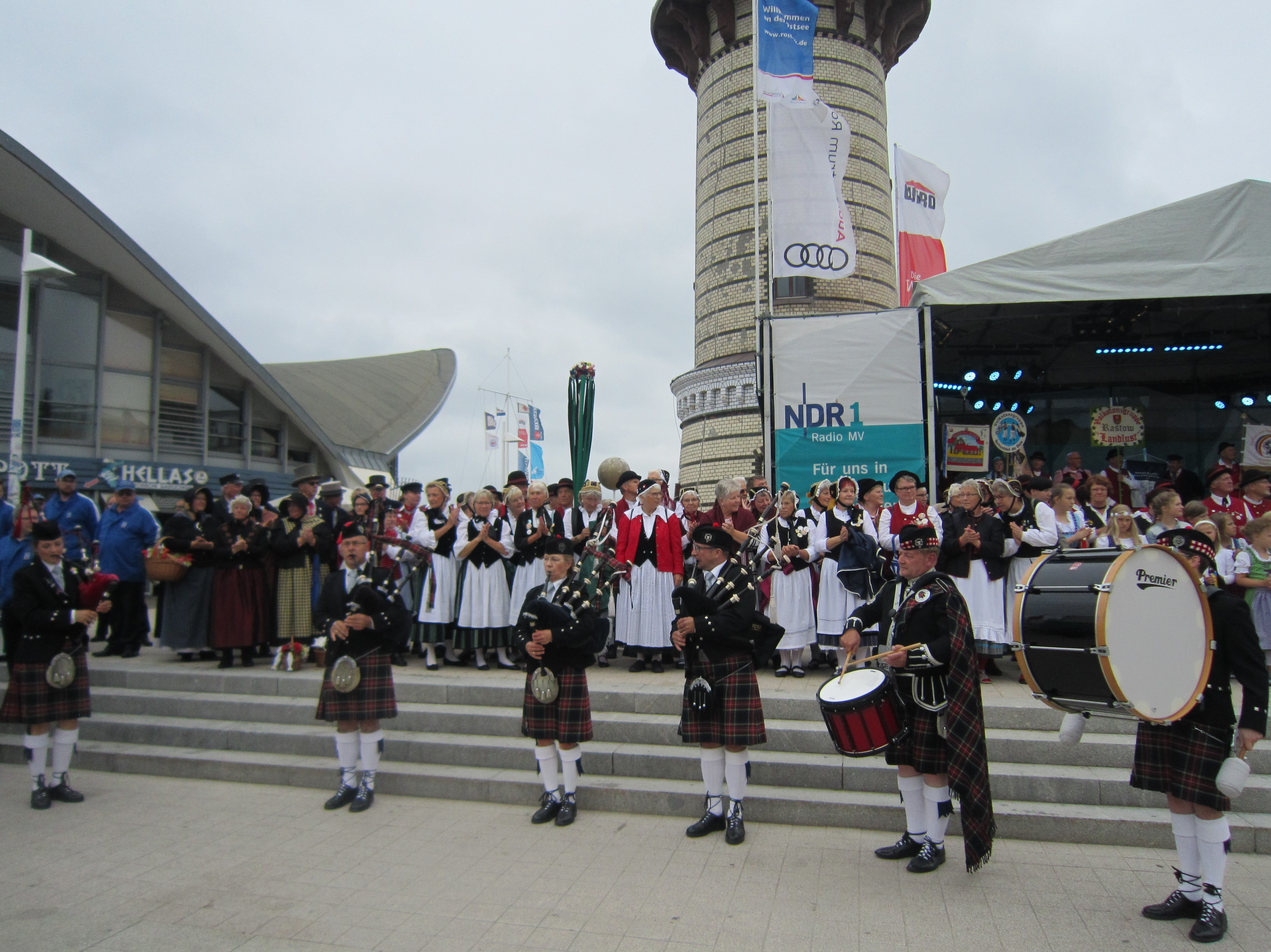 Die Weltmeisterin im Sackpfeifenspiel (2017), Anna Kummerlöw aus Kladrum, und ihre Begleitband, der Clan MacLanborough Pipes & Drums, traten am 14. Juli 2019 im Rahmen der 82. Warnemünder Woche zusammen mit den Teilnehmenden des Trachtenumzugs vor dem Leuchtturm Warnemünde auf.